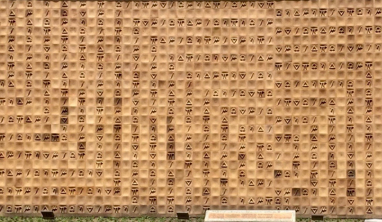 Mural de la Escuela de Ingenierías de la Universidad Pontificia Bolivariana en Medellín; elaborado por Pablo Jaramillo.